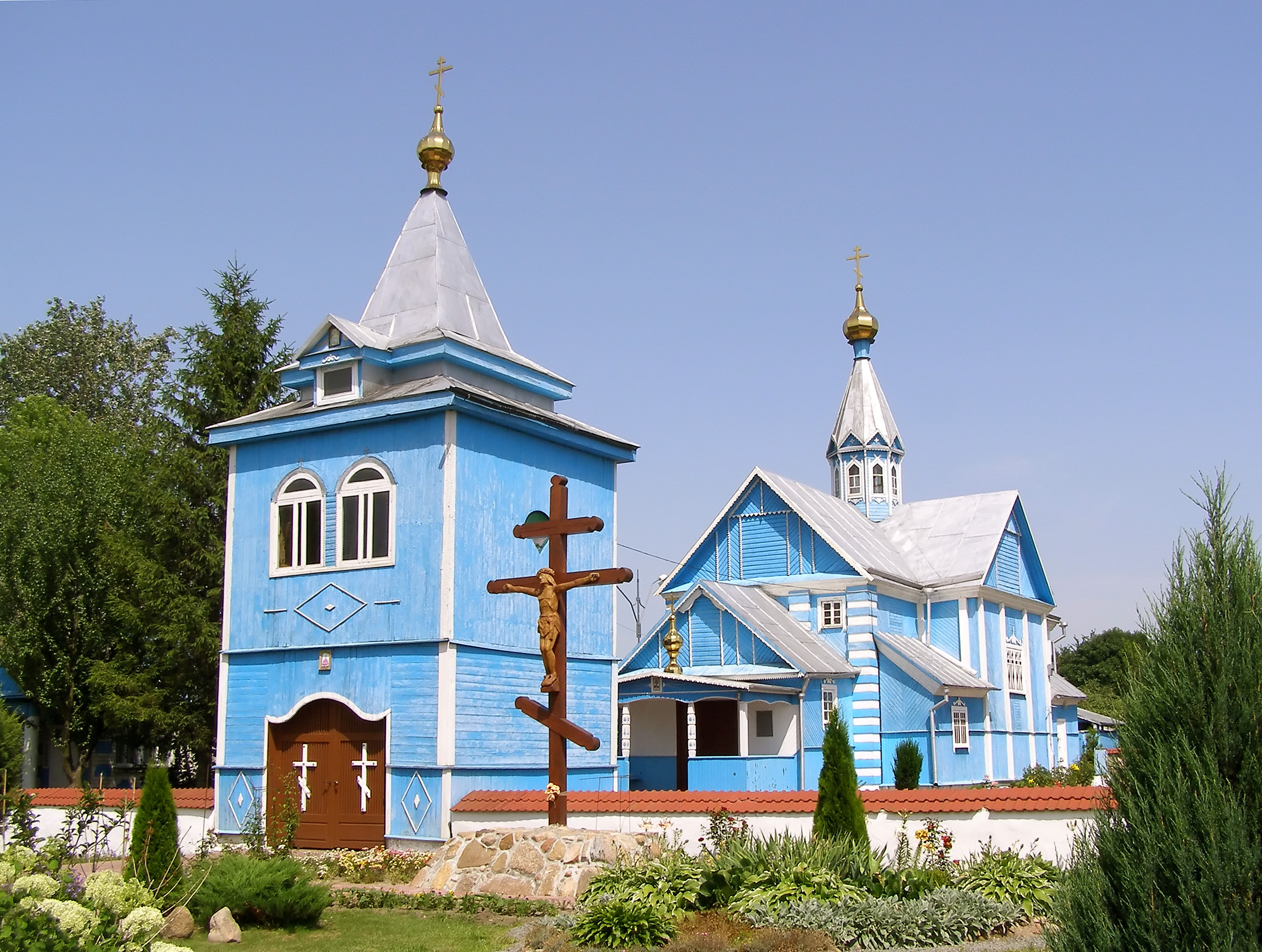 Беларуская (тарашкевіца): Царква Параскевы Пятніцы. в. Чарнаўчыцы This is a photo of Belarusian heritage monument. Reference number: 112Г000121 ( WLM)